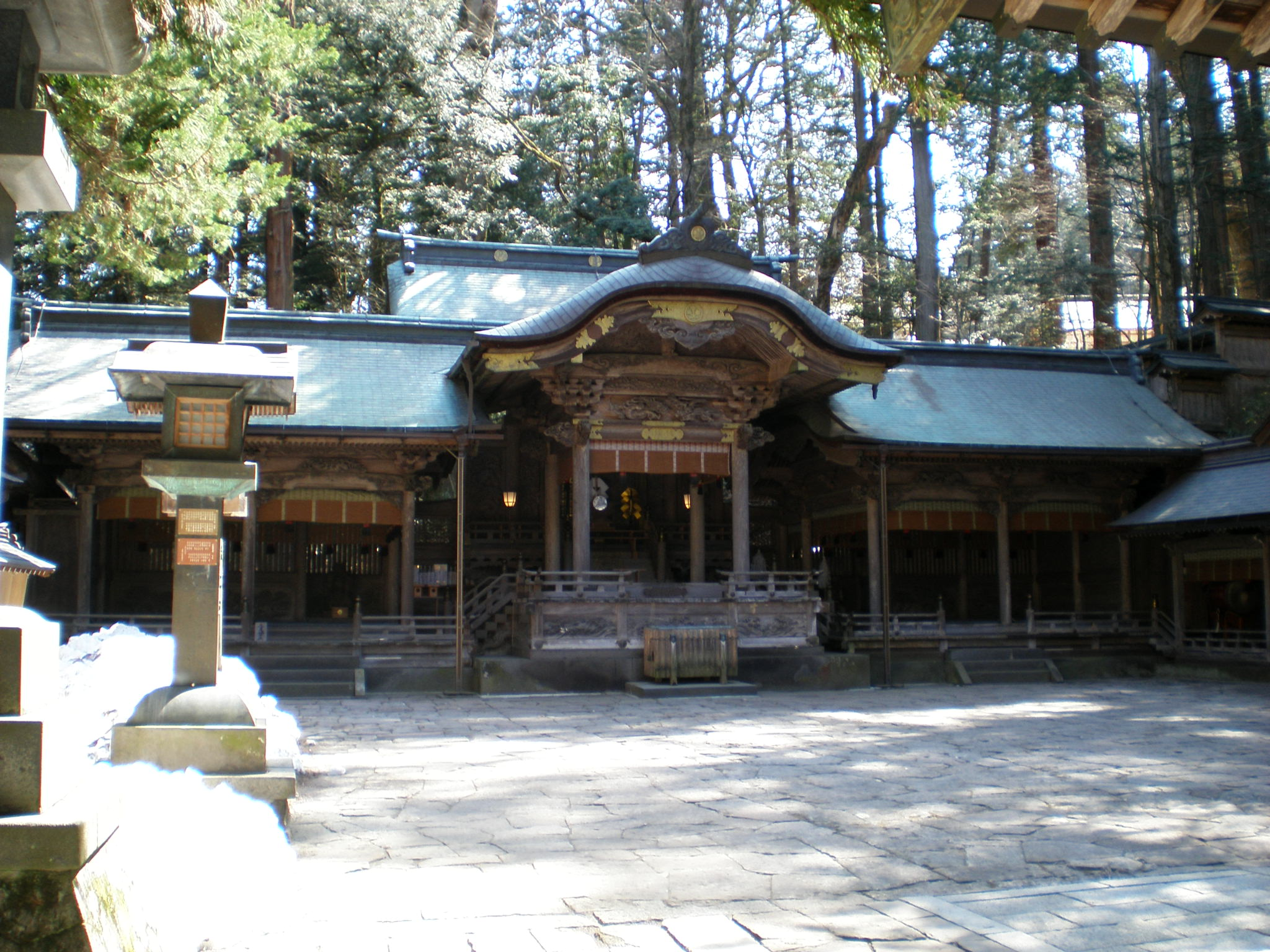 諏訪大社本宮拝殿。